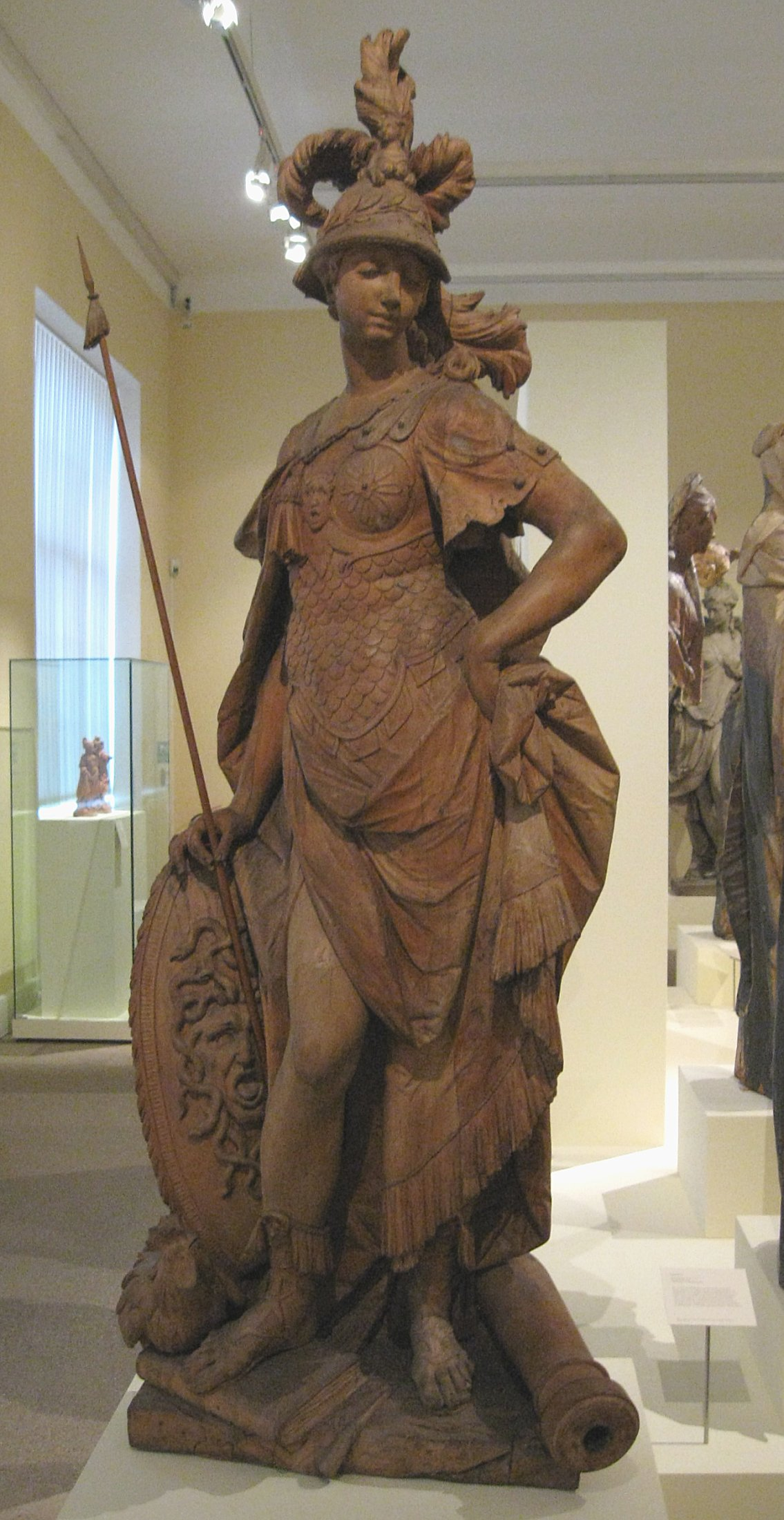 Ignaz Günther: Minerva, um 1768, Lindenholz, Bayerisches Nationalmuseum in München